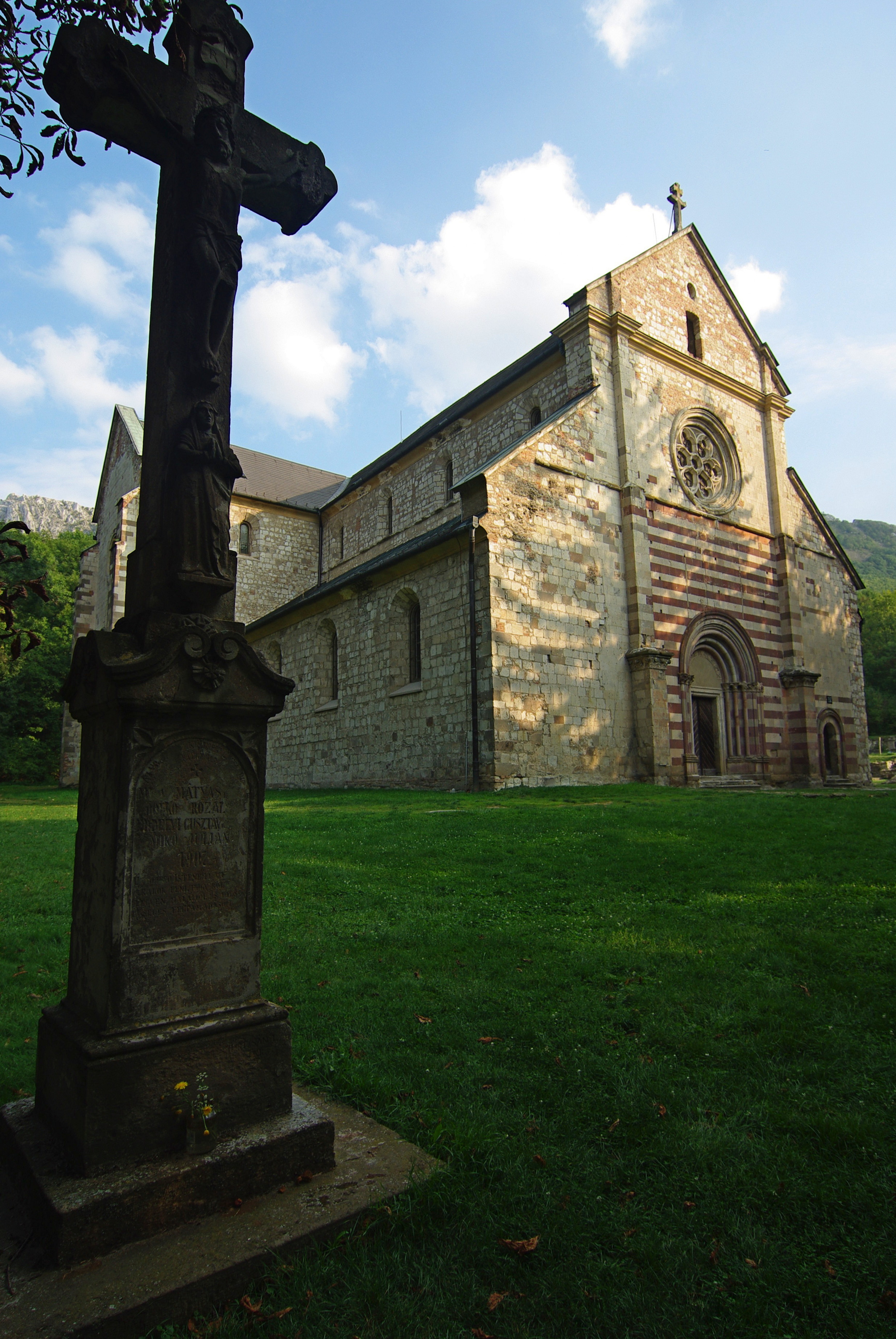 Épült 1232 után, 15. század közepi részletekkel védettség: Műemléki védelem azonosító: 5433 törzsszám: 2131 Bővebben ld.